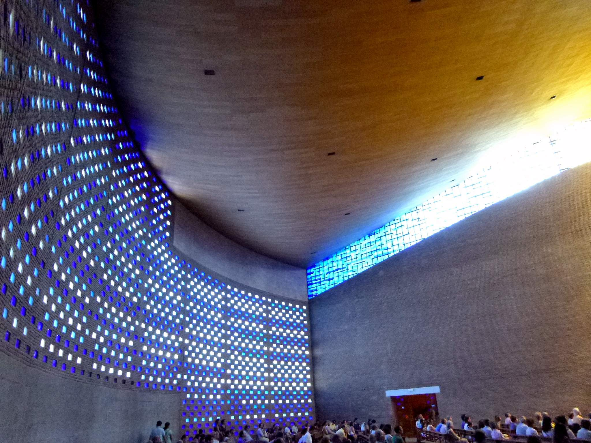 Iglesia de San Pedro Mártir (Dominicos), en Madrid